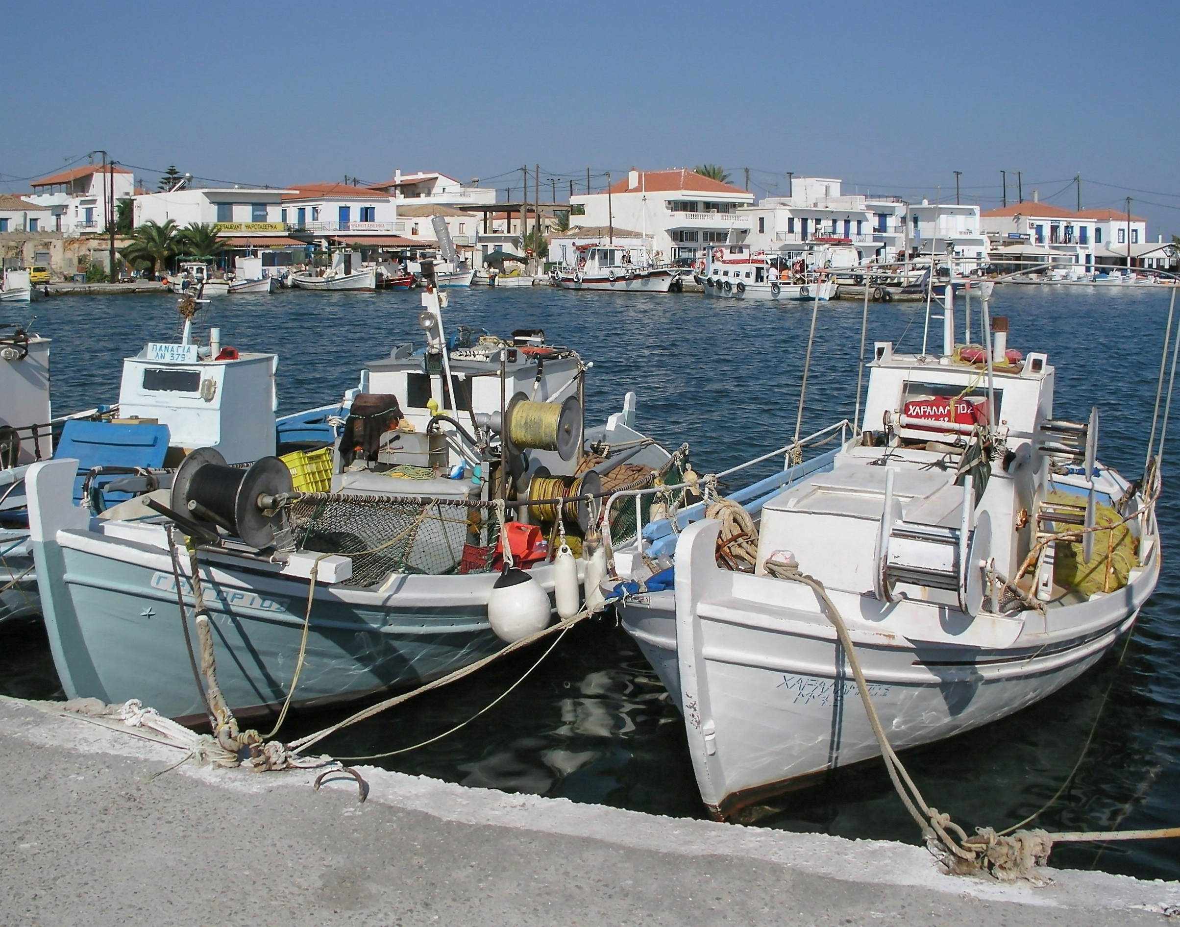 Elafonissos Hauptort